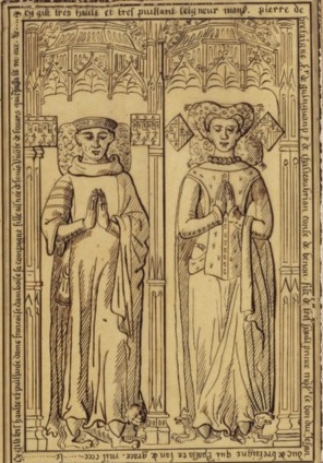 Petr II. Bretaňský a manželka